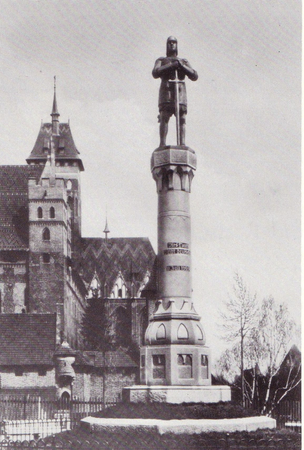 Zur Erinnerung an das eindeutige Votum für den Verbleib bei Ostpreußen wurde nach 1920 in Marienburg das Abstimmungsdenkmal errichtet.